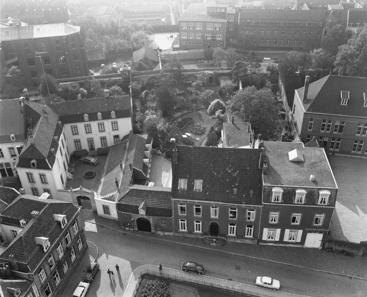 Overzicht: overzicht vanaf Sint Janstoren